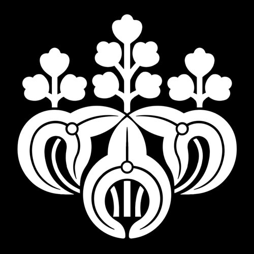 「澤瀉桐」紋（染抜）